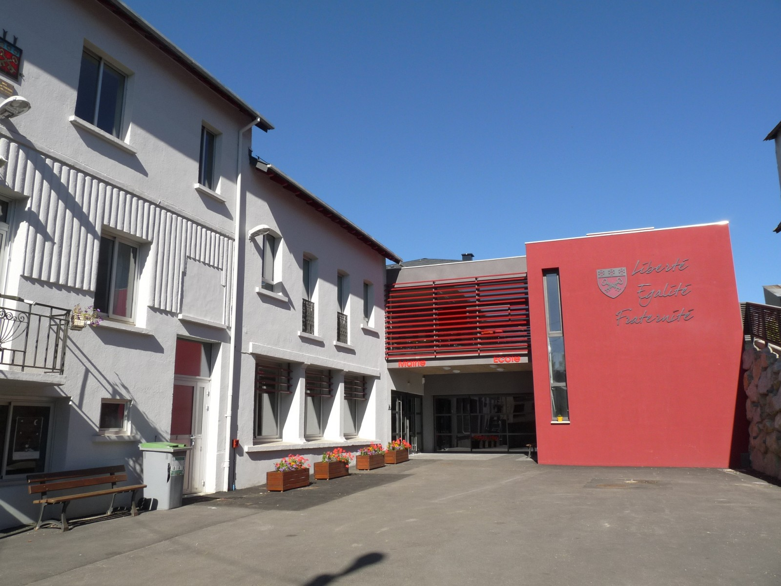 Mairie de St-Pierre-dels-Forcats, Pyrénées-Orientales, France